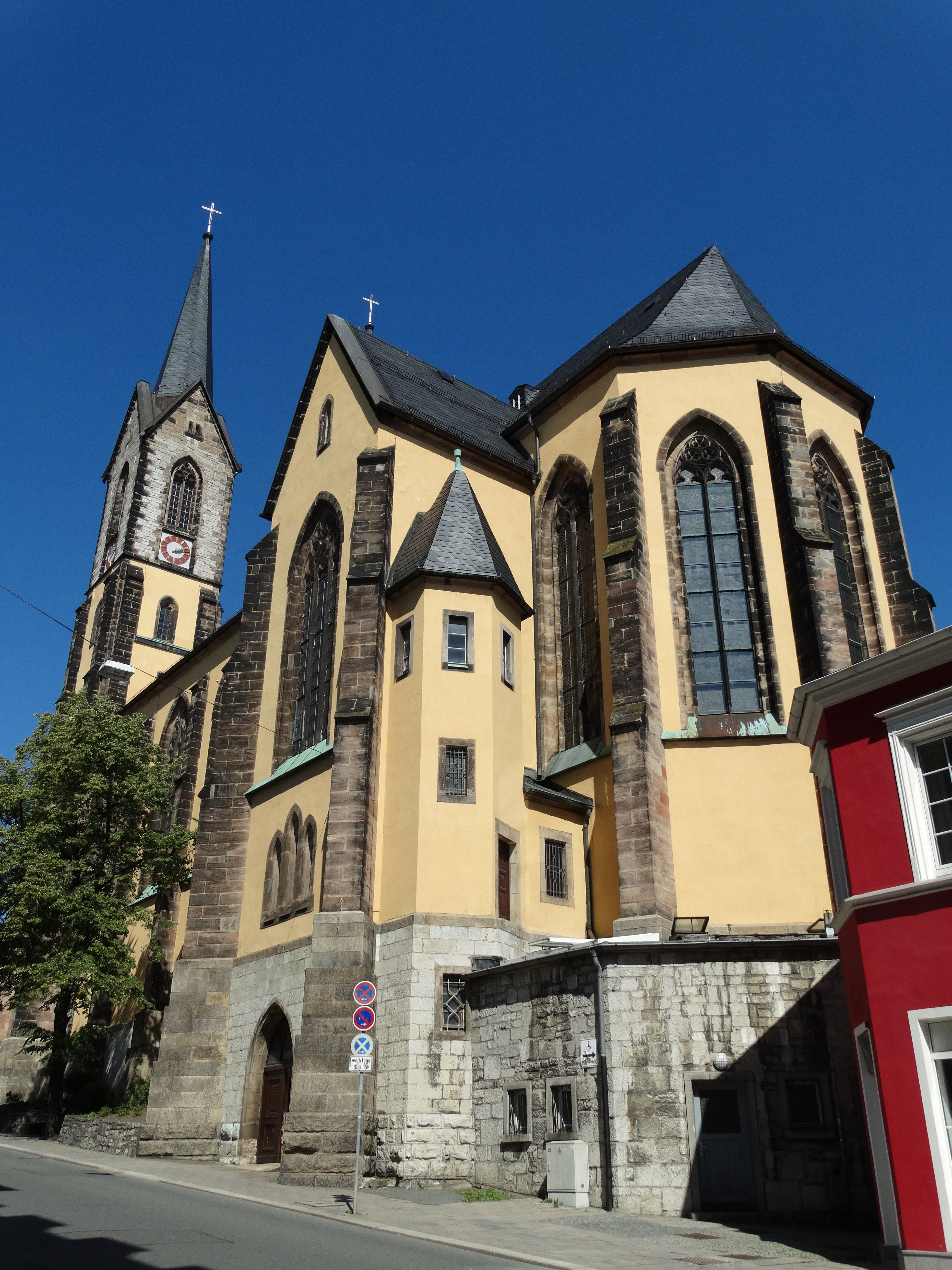 St. Marienkirche vom Sonnenplatz